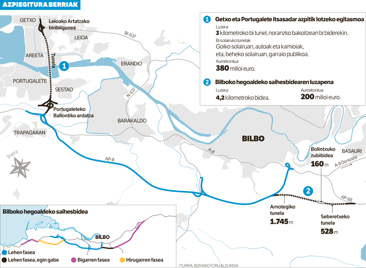 Azpiegitura berrien proiektua Bilboaldean 2020an. Bolintxu-Supersur eta Getxo/Portugalete tunela